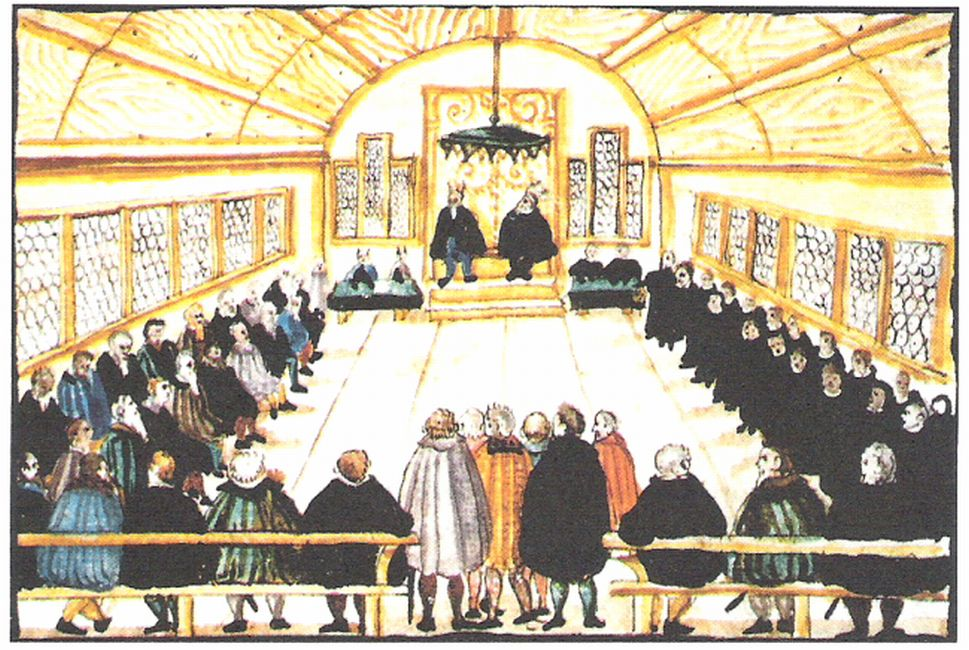 Täuferdisputation in Zürich im Jahr 1525. Am Tisch links vermutlich zwei Täufer (Blaurock und Mantz?), erhöht in der Mitte die zwei Bürgermeister, am Tisch rechts Zwingli(?) und Jud(?).